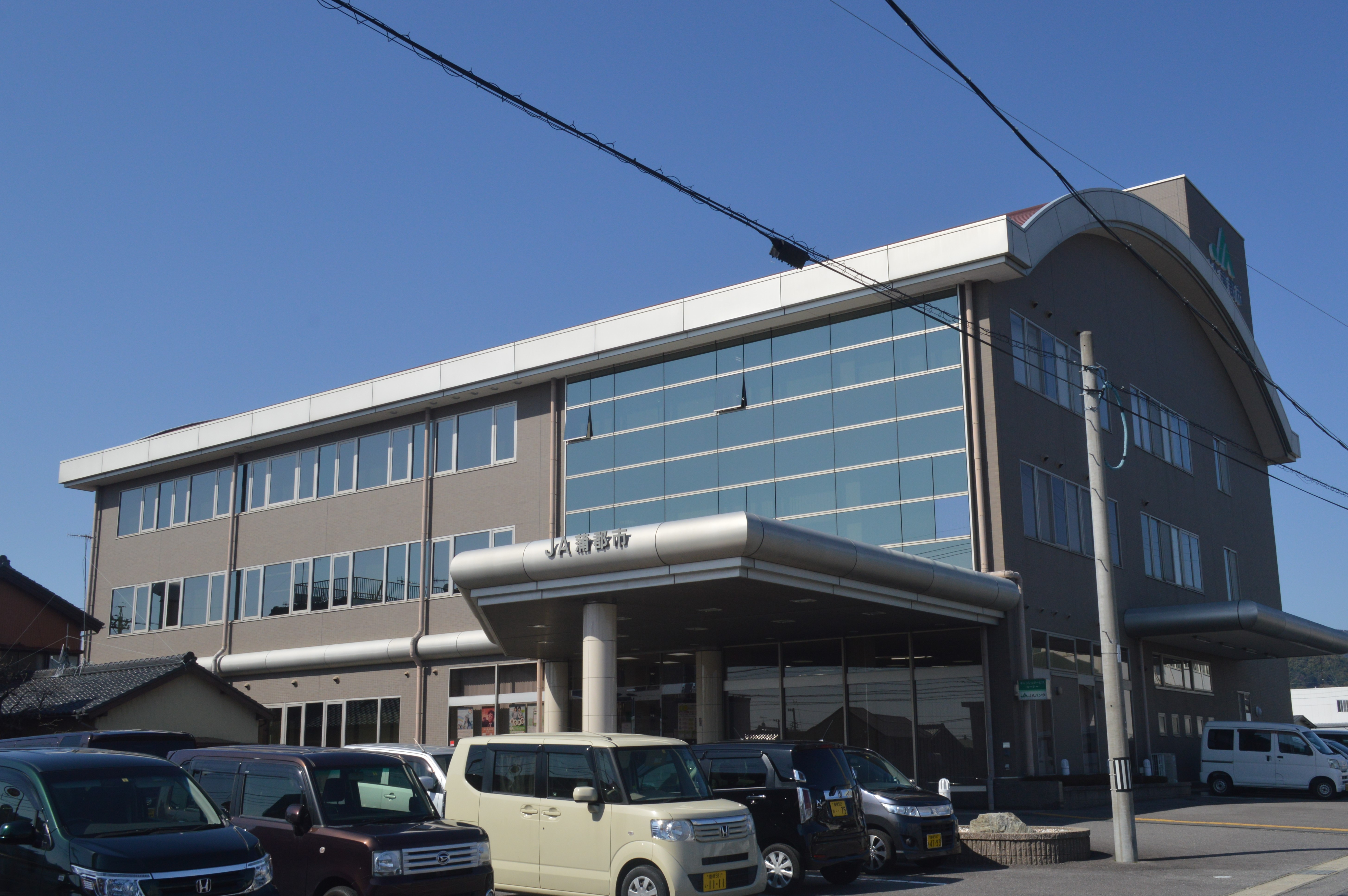 愛知県蒲郡市宮成町2-1にあるJA蒲郡市本店。